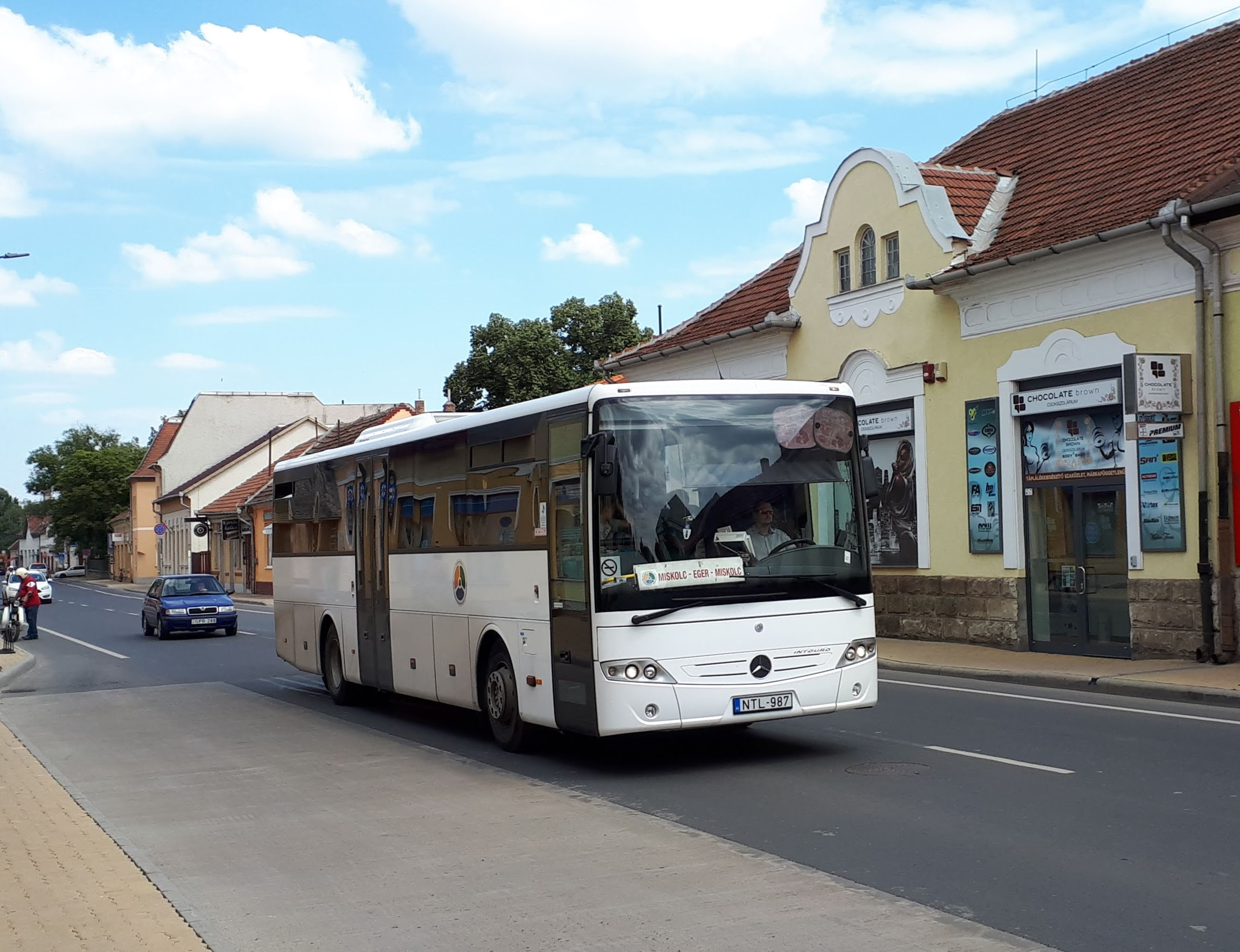 Az ÉMKK NTL-987 rendszámú Mercedes Intouro busza Mezőkövesden, a 1380-as helyközi járaton.